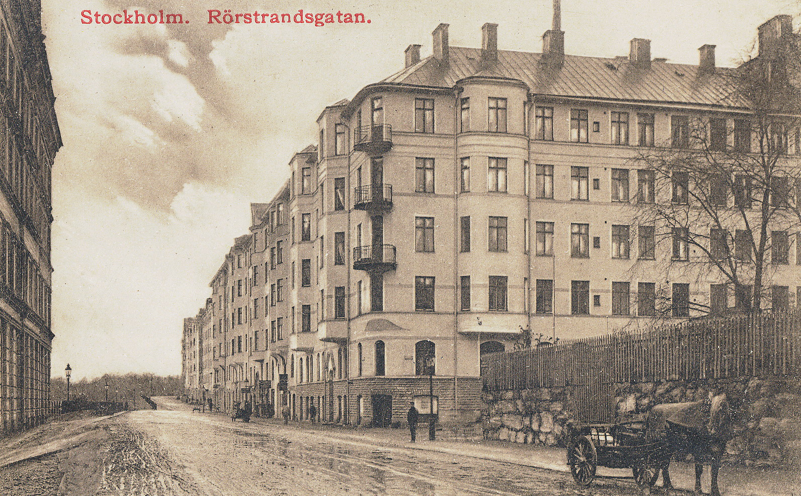 Rörstrandsgatan mot norr